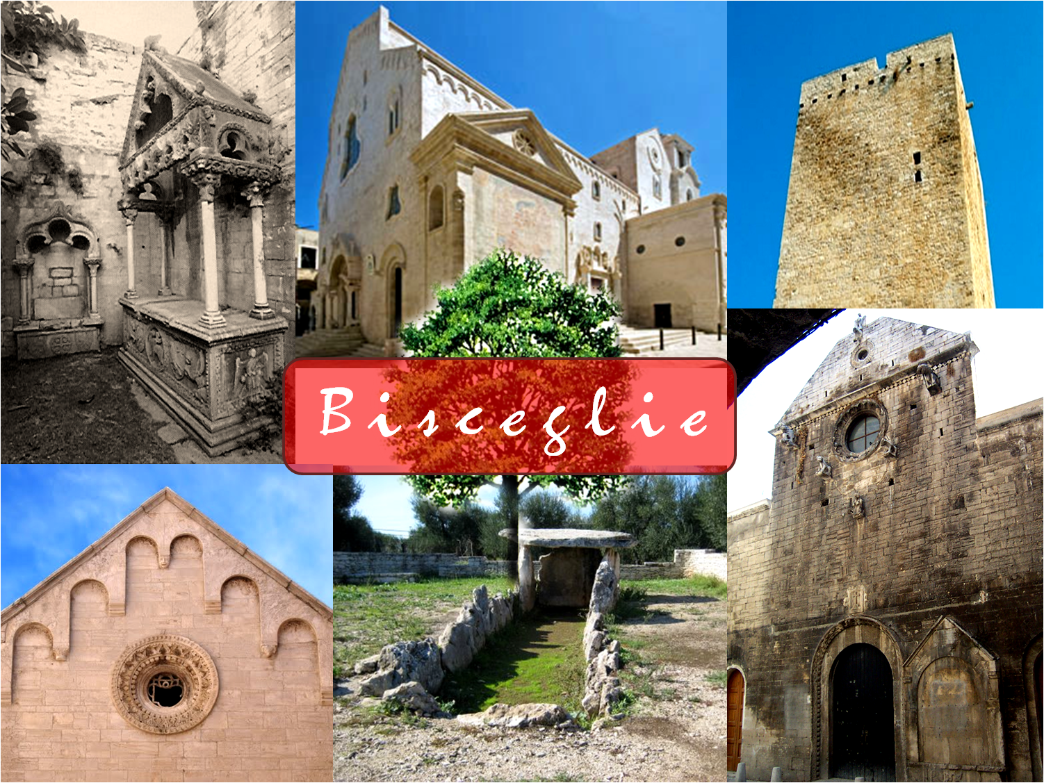 Bisceglie